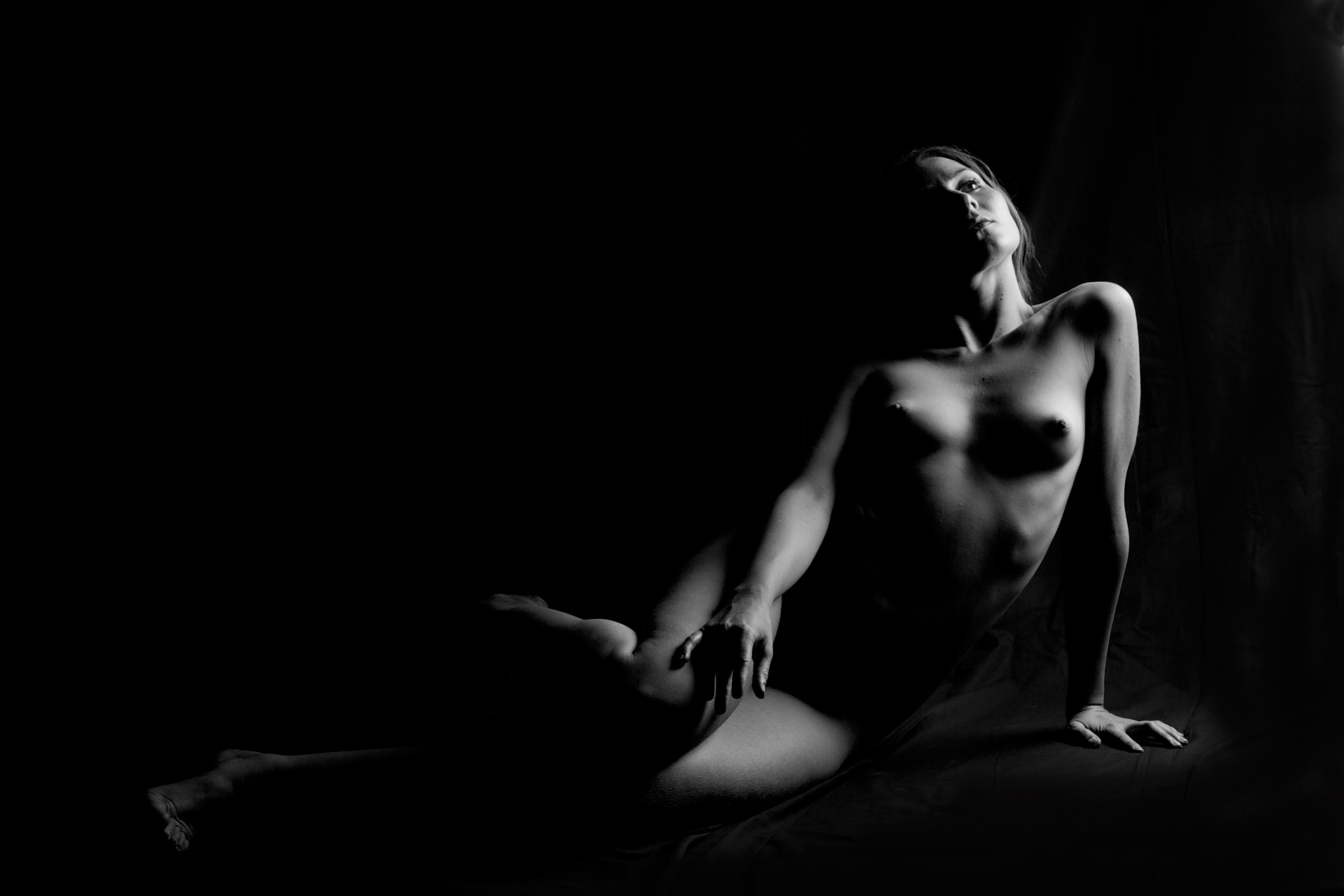 Aktstudie: Low-key-Fotografie